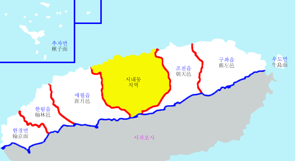 Jeju city